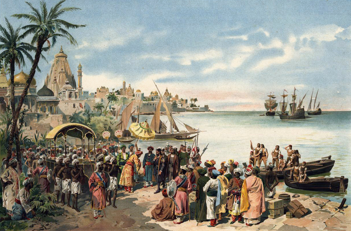 A chegada de Vasco da Gama a Calicute em 1498.label QS:Lpt,"A chegada de Vasco da Gama a Calicute em 1498."